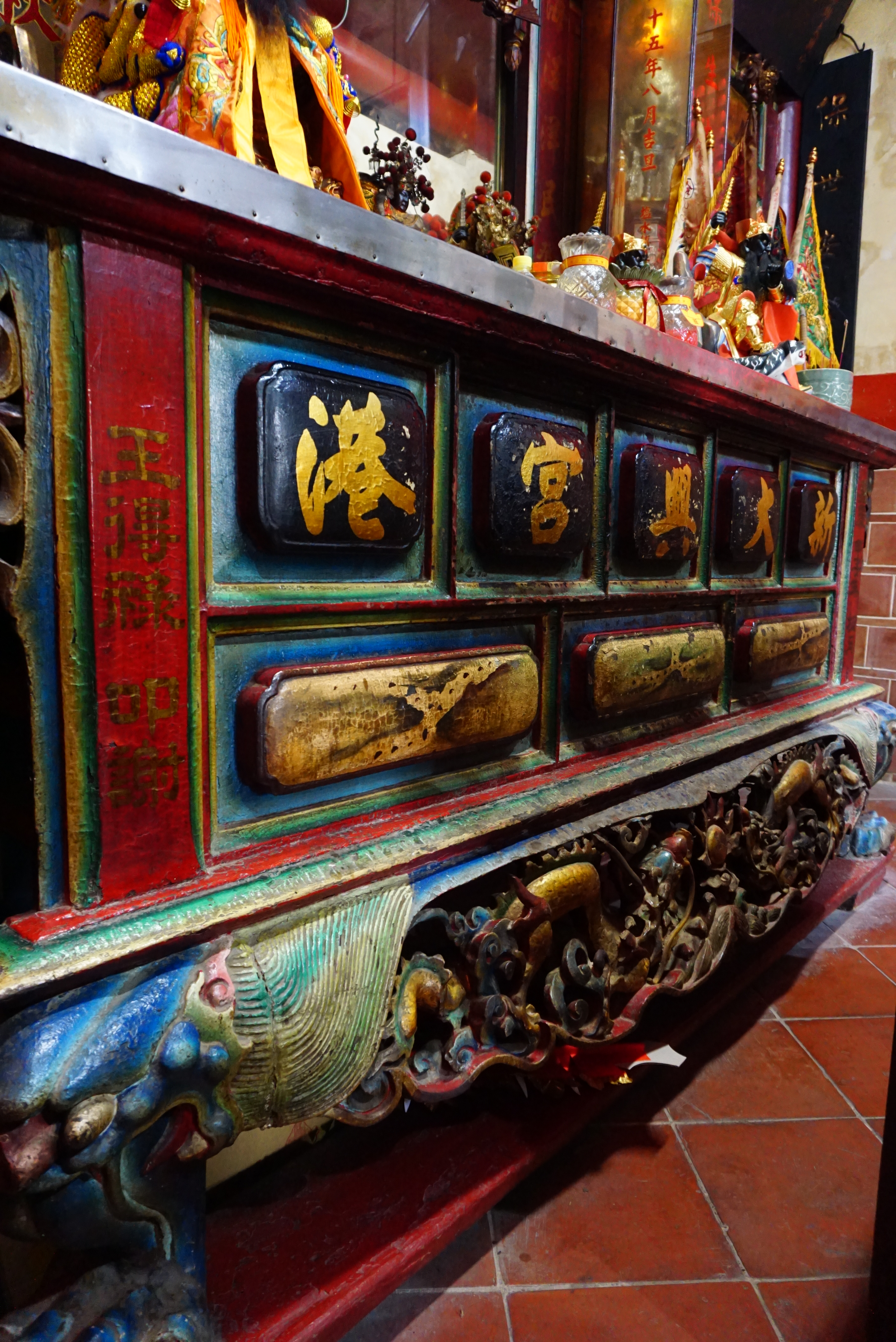 中文（台灣）: 新港大興宮內，王得祿敬獻的桌案